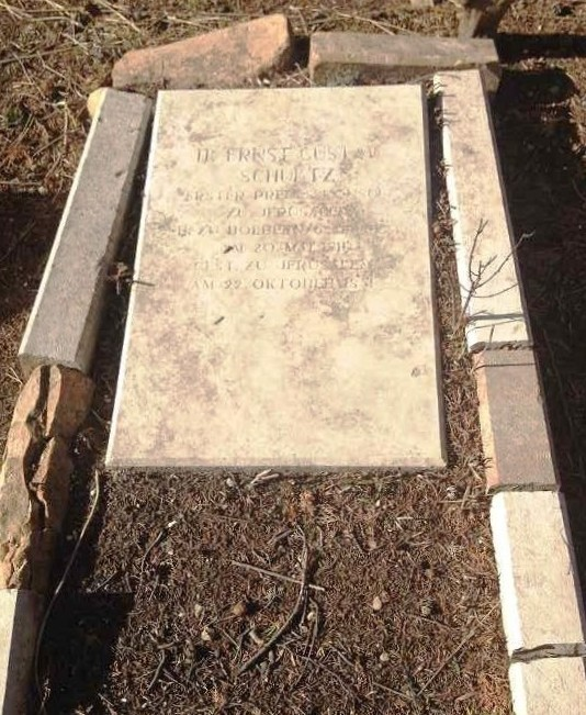 Ernst Gustav Schultz (Döbern *20. Mai 1811-22 Oktober 1851* Jerusalem), erster preußischer Konsul in Jerusalem (1842-1851), Grab auf dem Zionsfriedhof in Jerusalem